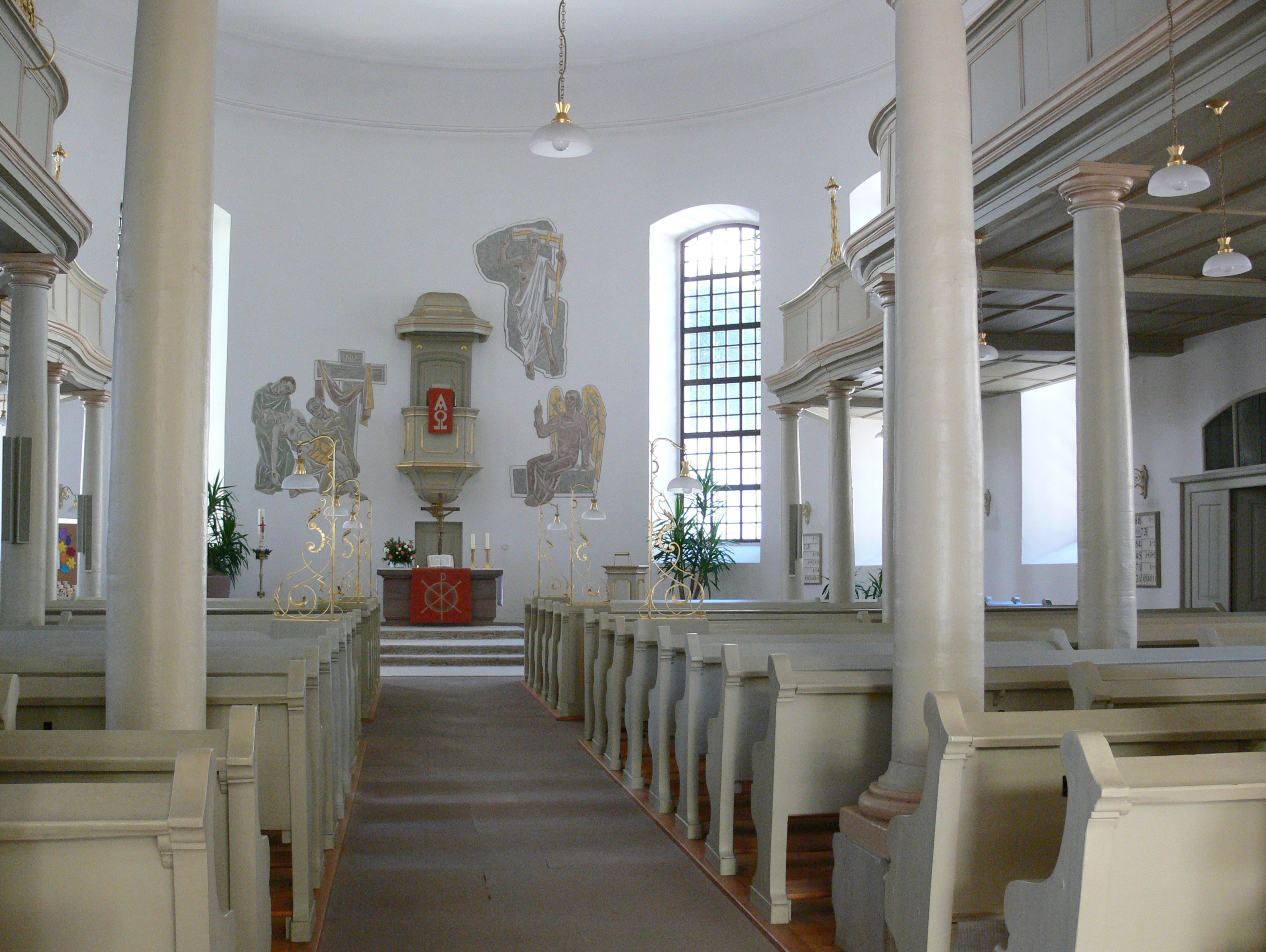 Evangelische Stadtkirche, Kurplatz, Bad Wildbad